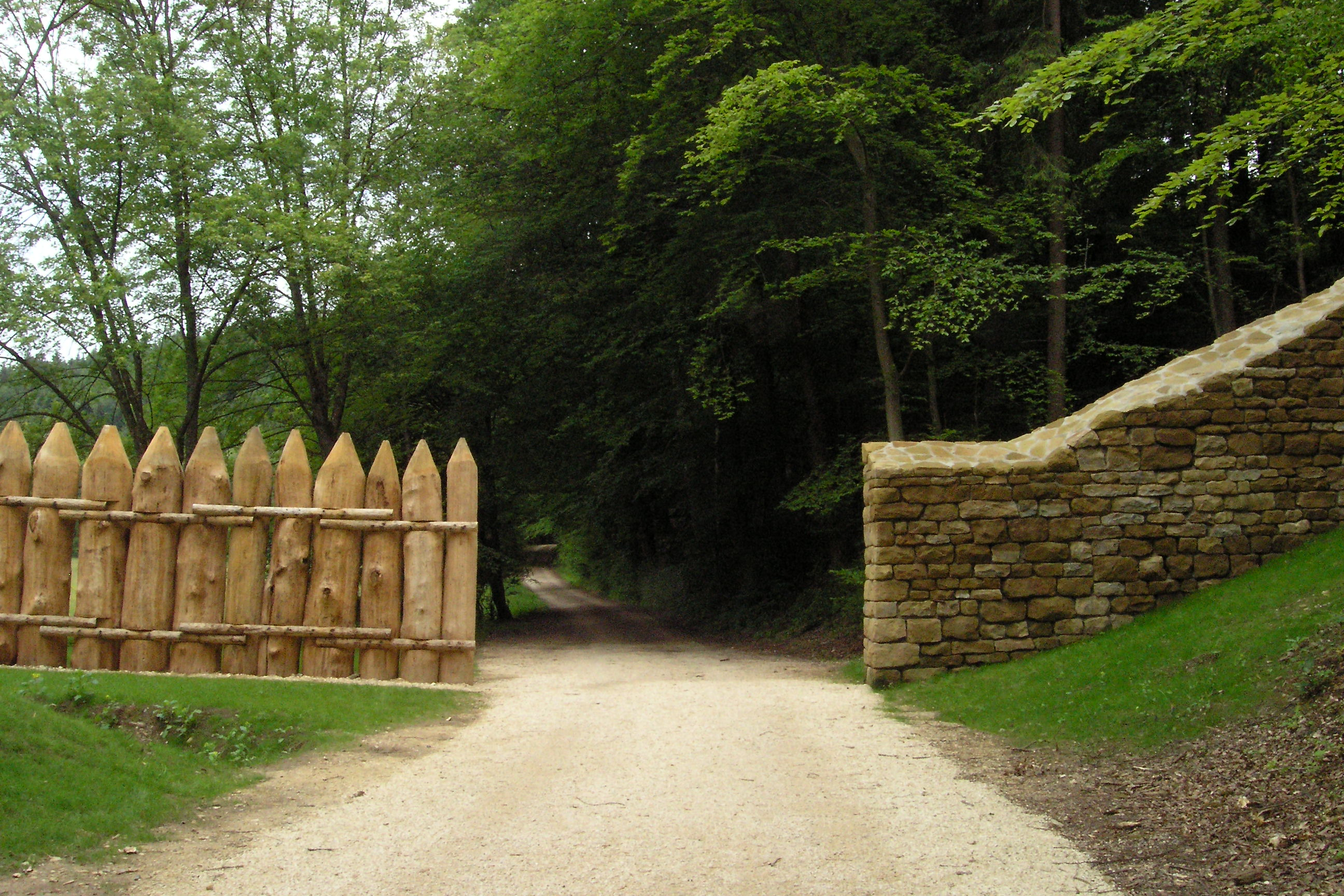 Rekonstruktion der älteren Palisade, die in dieser Form in Obergermanien weiterbestand und der jüngeren Mauer des Raetischen Limes im Rotenbachtal beim Kleinkastell Freimühle, nahe Schwäbisch Gmünd.